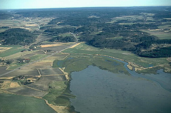 Vid Gullmarn Motiv: Sältorna-Färlev Nyckelord: Flygbilder, Naturreservat, Riksintressen Kategori: Dalgångsbygd Vid Gullmarn.